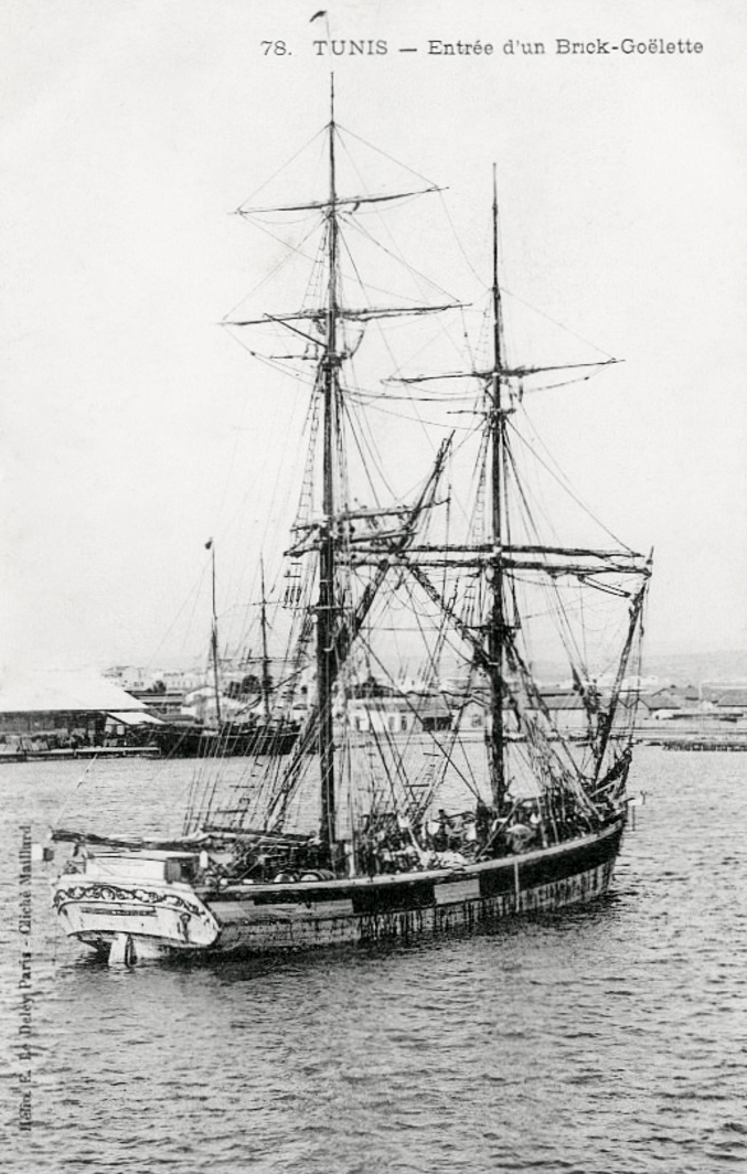 Entrée d'un brick-goëlette à Tunis, vers 1905.